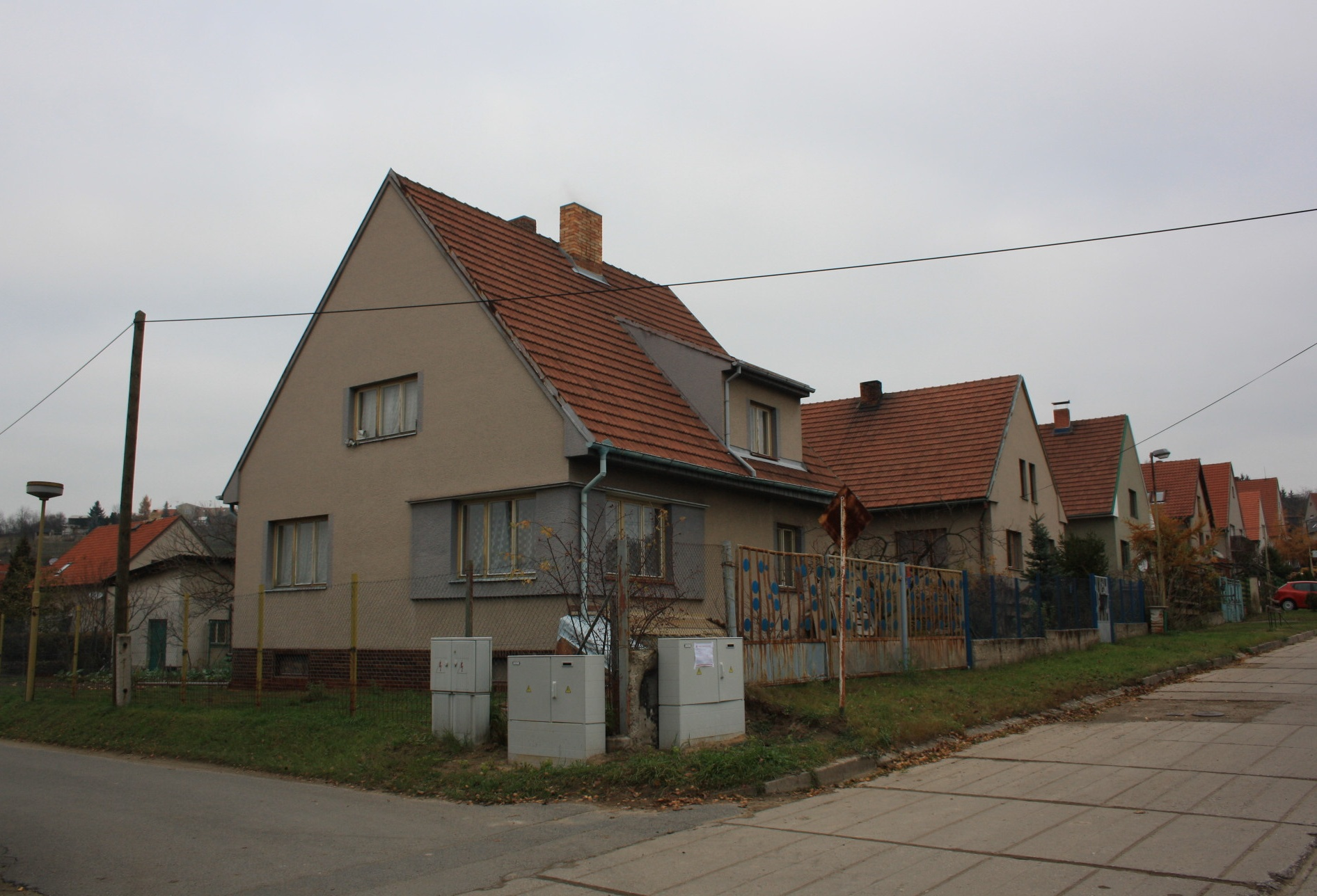 Zástavba (počínaje domem čp. 286, následujícím vpravo domy čp. 285, 284, 283, 282, 281 a 280) v Lomu, části obce Kly.